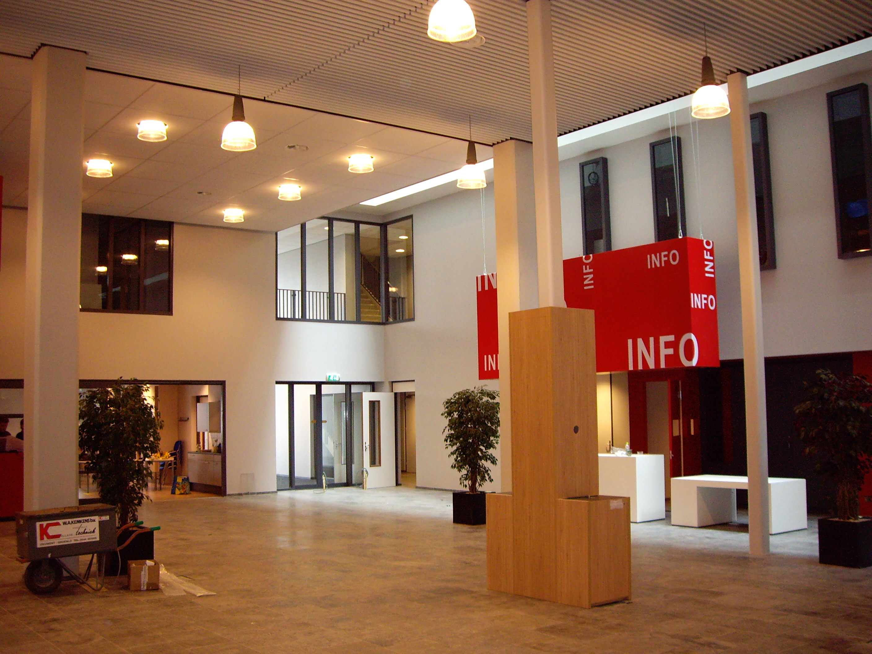 Aanzicht dok Zuid